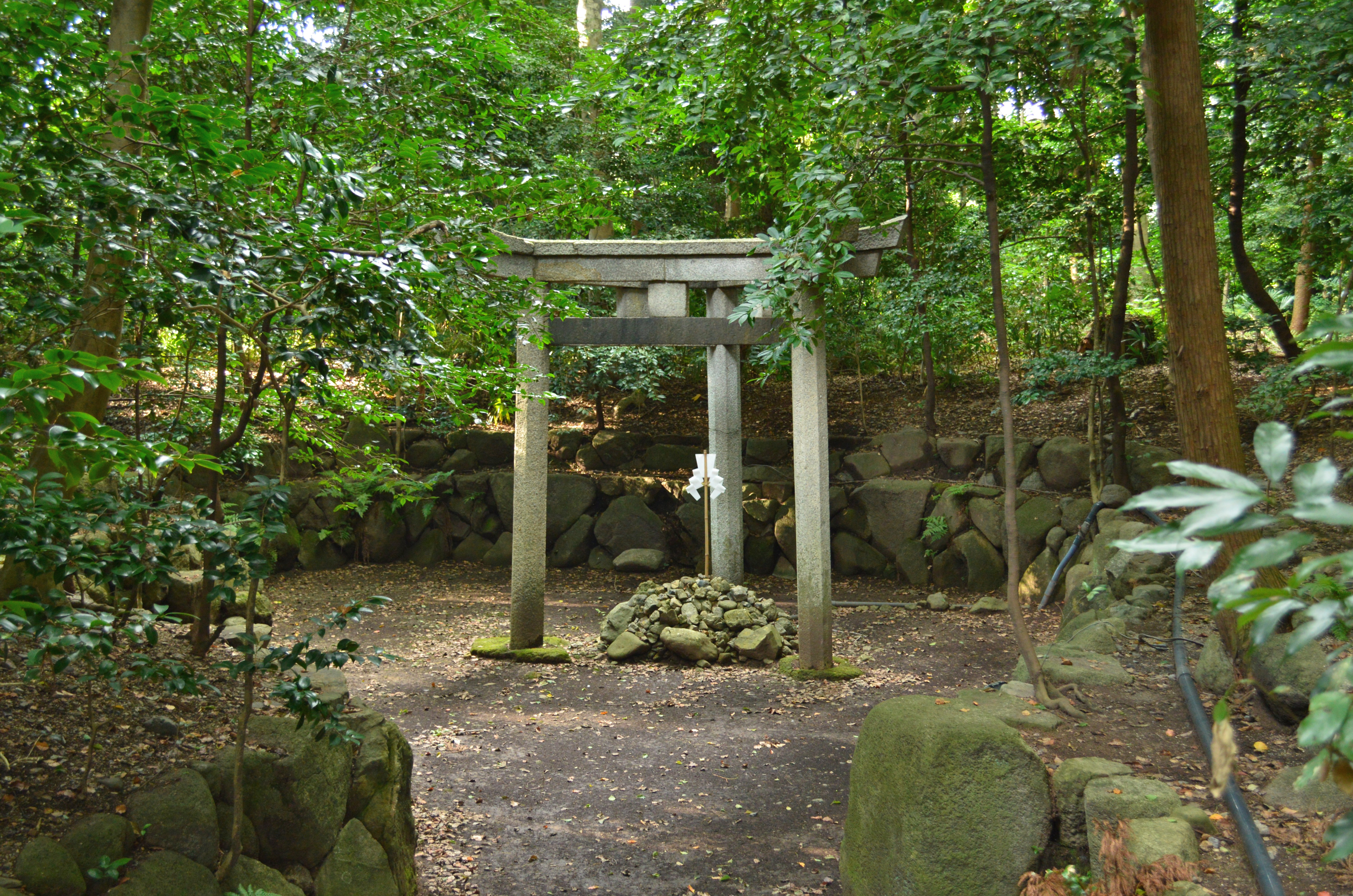 木嶋坐天照御魂神社 三柱鳥居